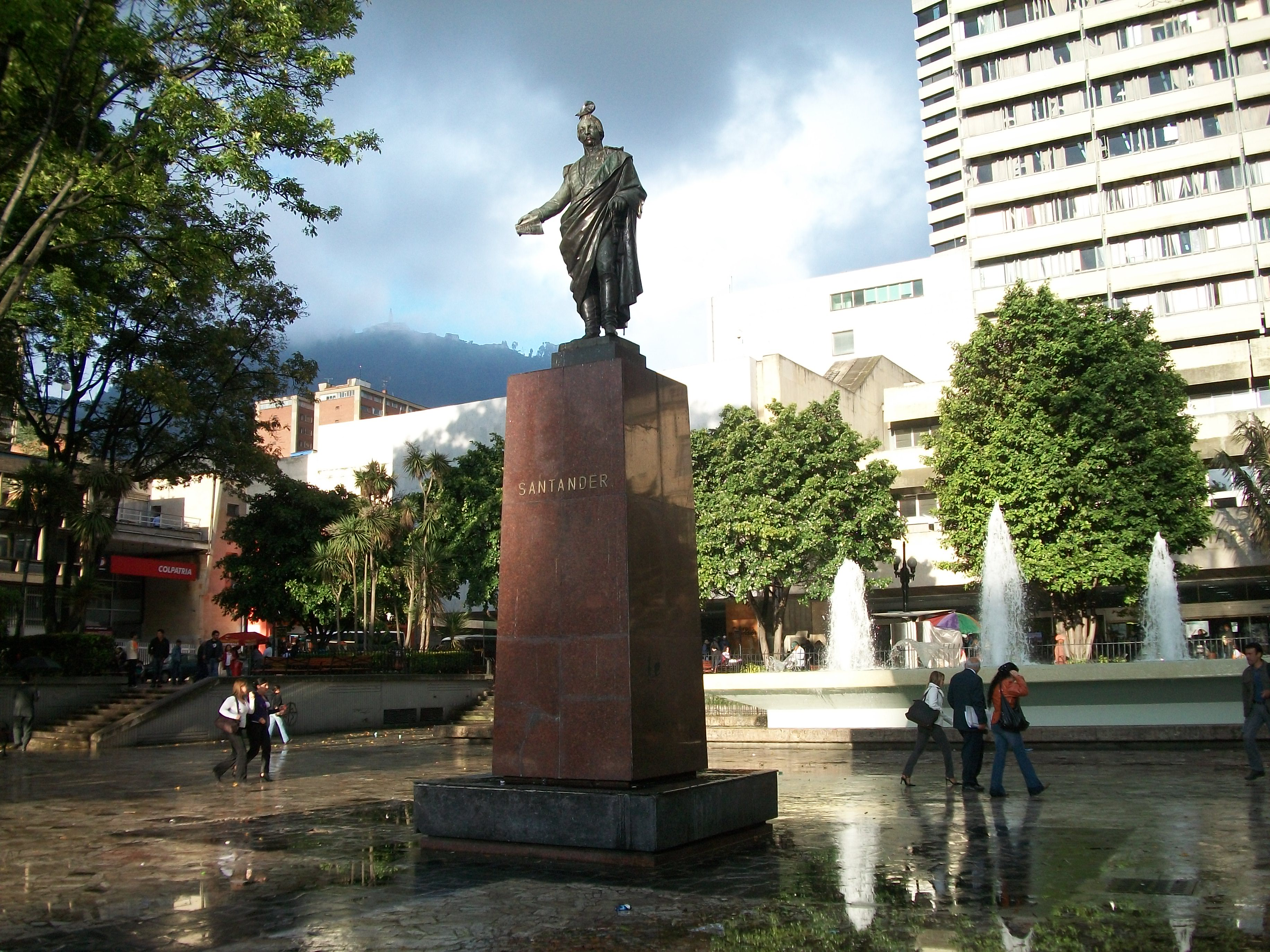 Bogotá, estatua de Frnacisco de Paula Santander en el parque homónimo, en la carrera Séptima con calle Dieciséis.